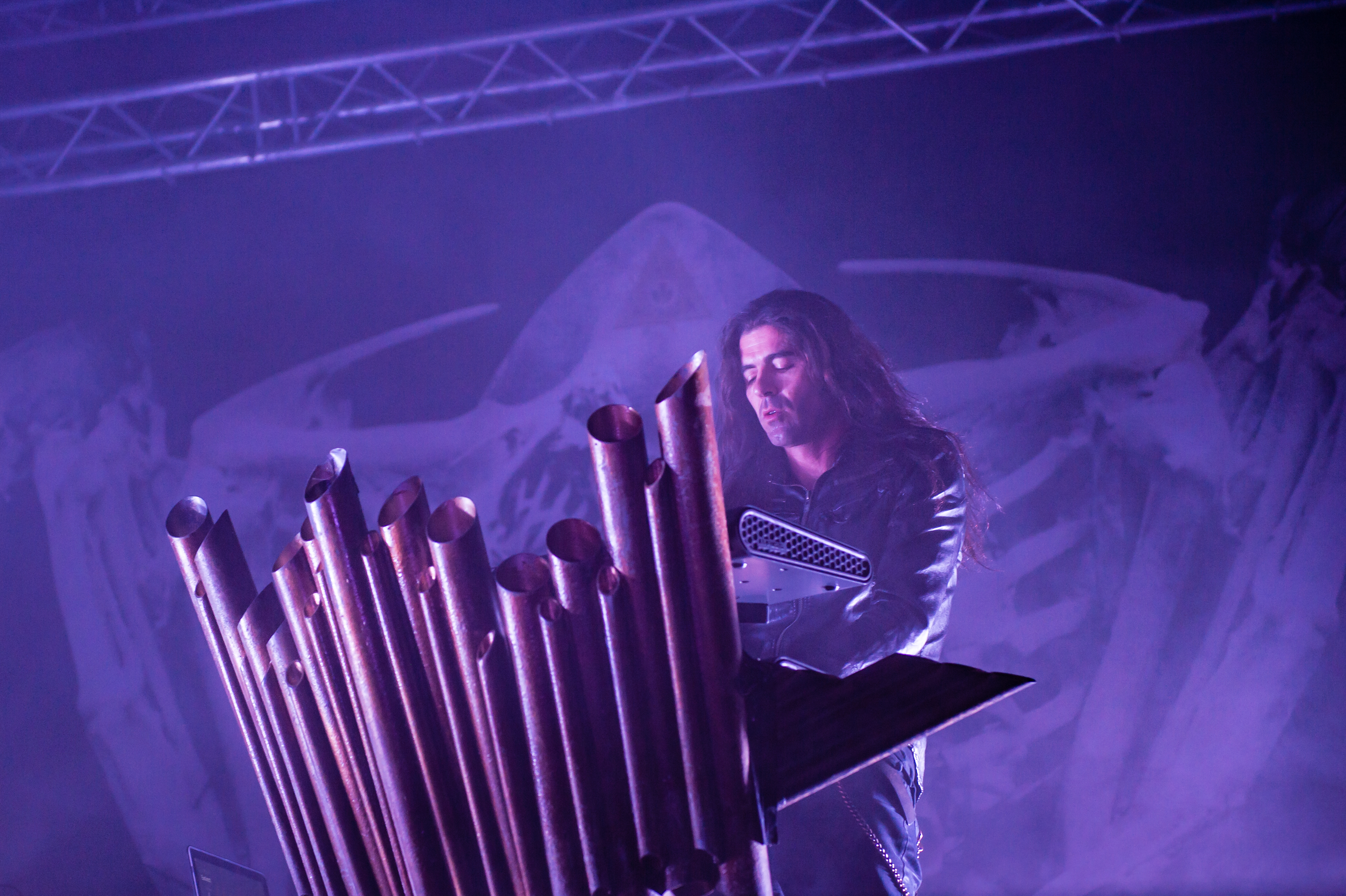 'Moonspell - Epic Metal Fest - Eindhoven'